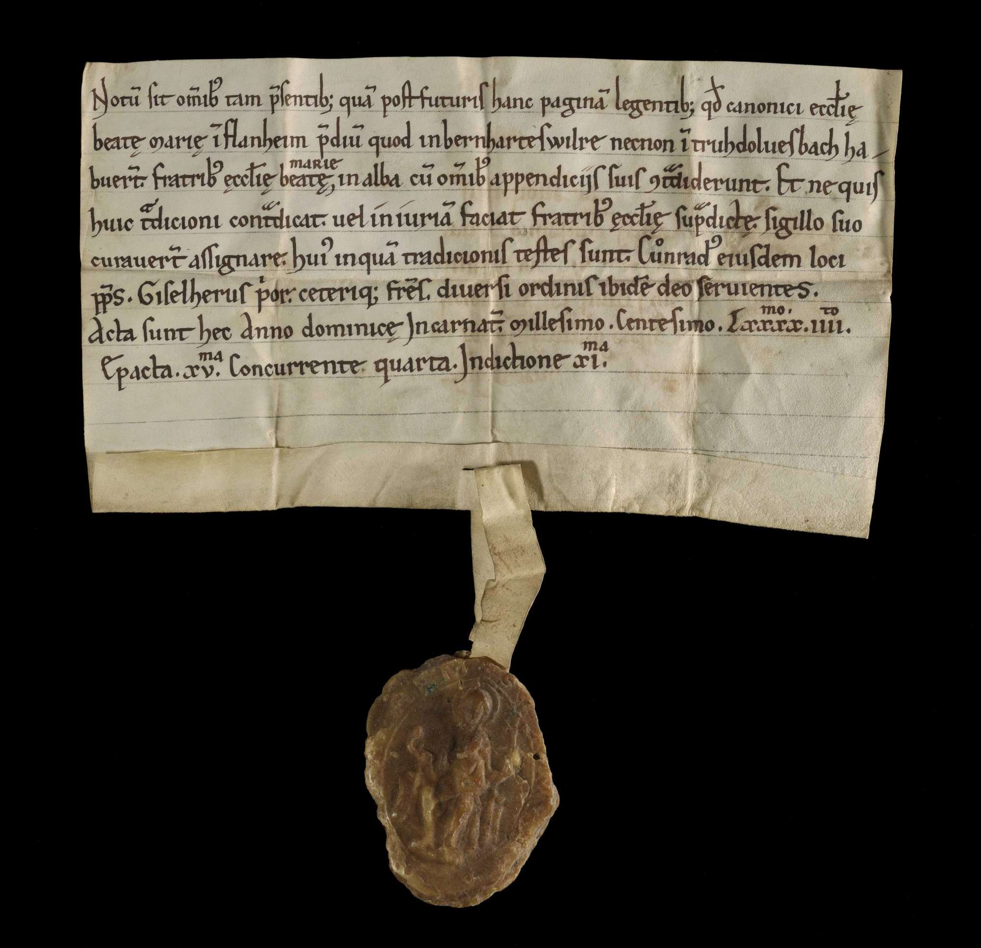 Urkunde: Das Stift Flonheim überlässt ein Gut in Bernhardsweiler und Truhdolvesbach an das Kloster Herrenalb... Nutzungsbedingungen ausdrücklich auch für Wikipedia (siehe: [1]